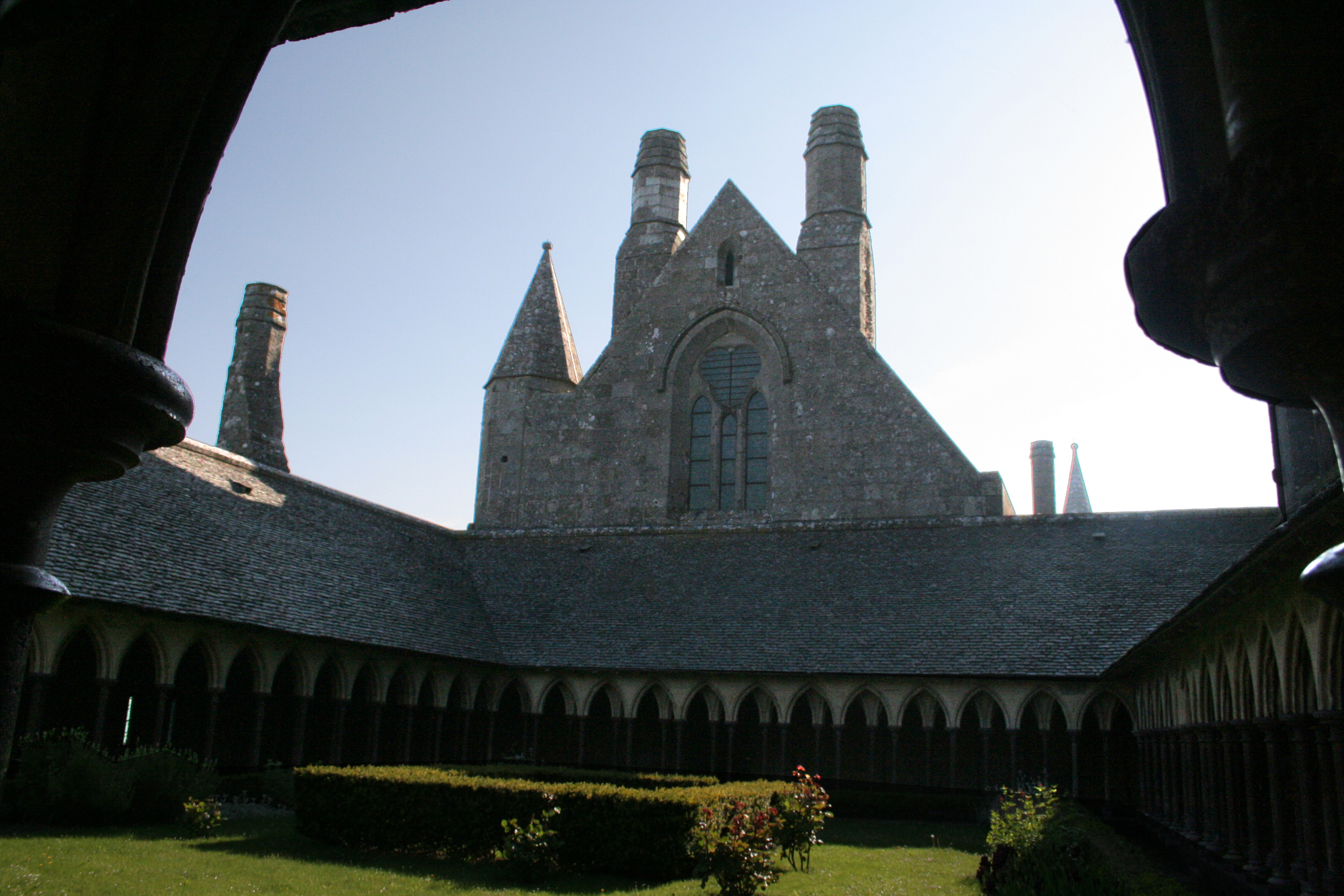 Cloître de l'Abbaye du Mont-Saint-Michel